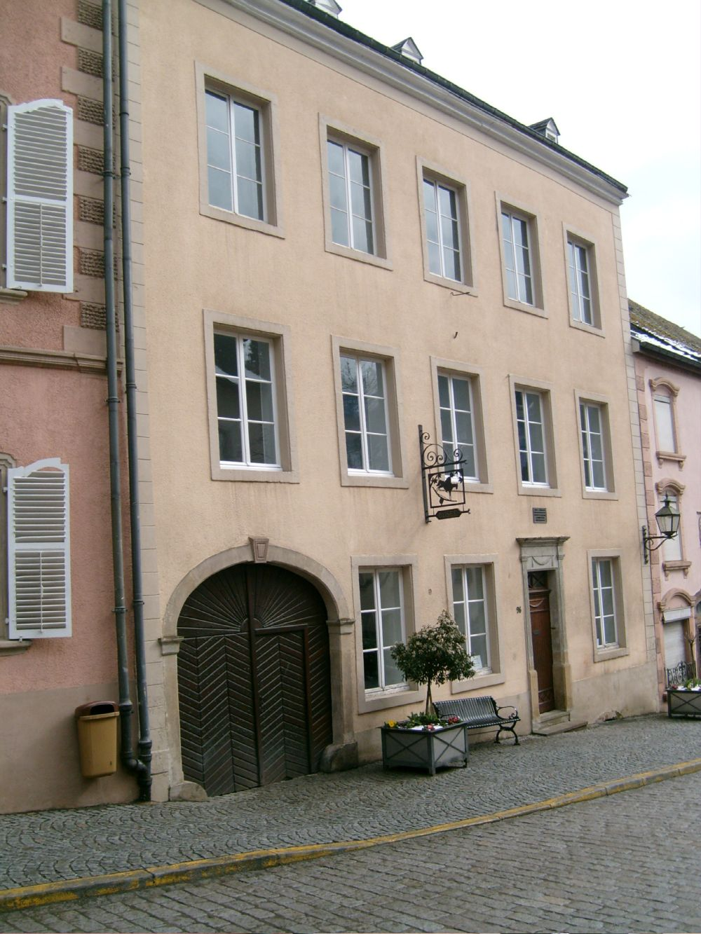 Dem Dicks säi Stierwhaus zu Veianen, 26. Mäerz 2008